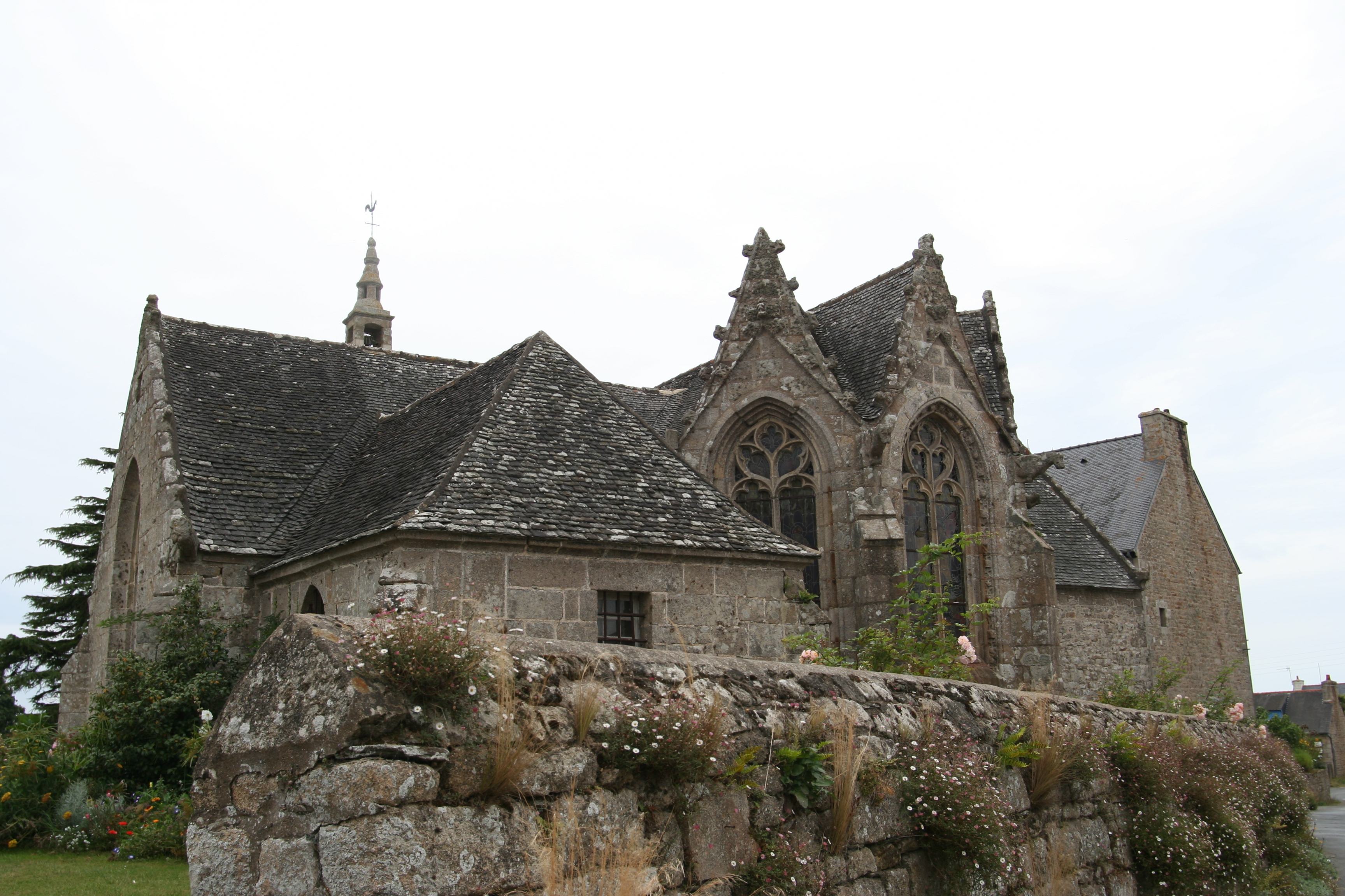 Iliz Ploulec'h.